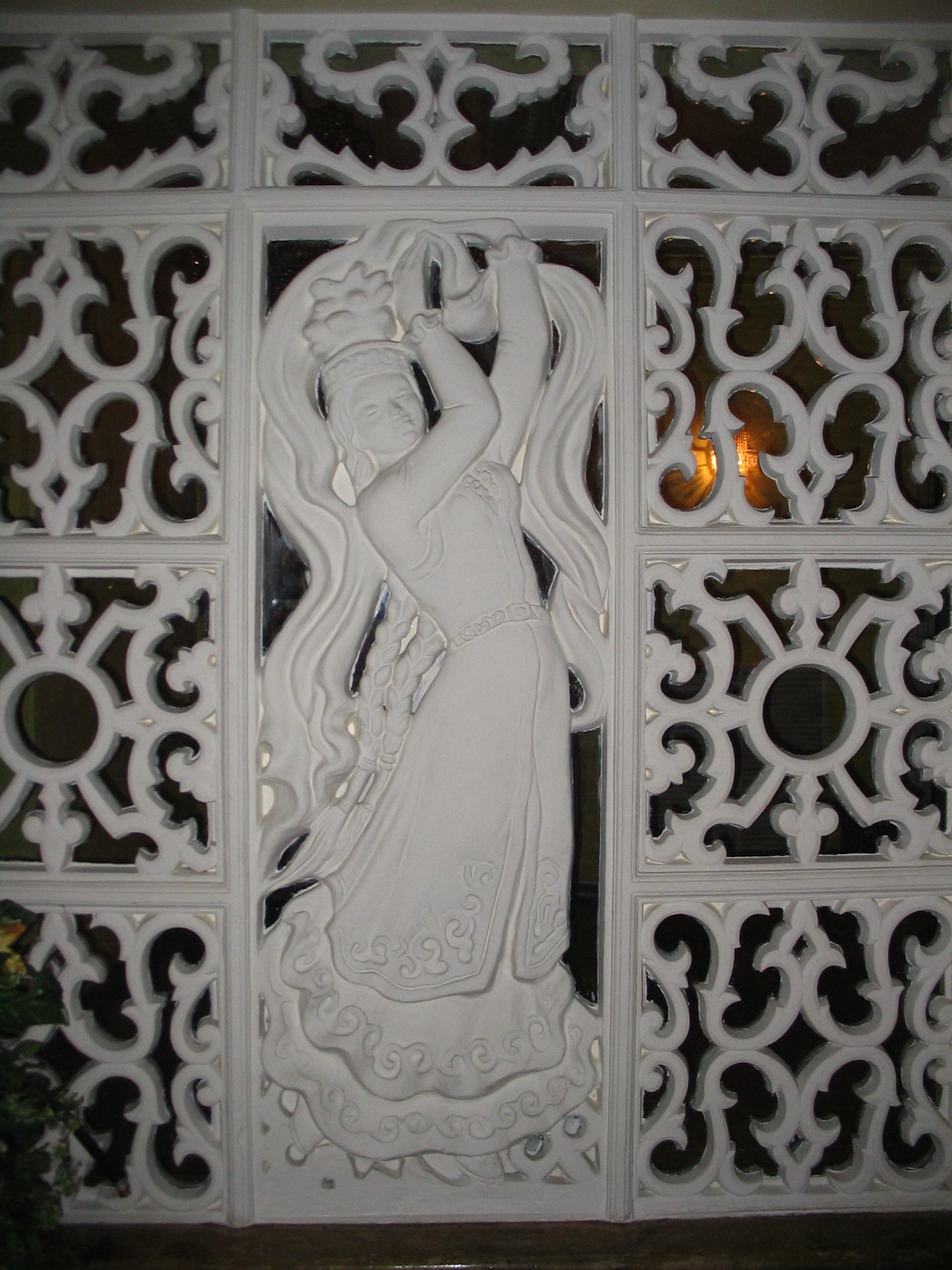 Дворец культуры горняков в Караганде. Элемент внутреннего оформления.